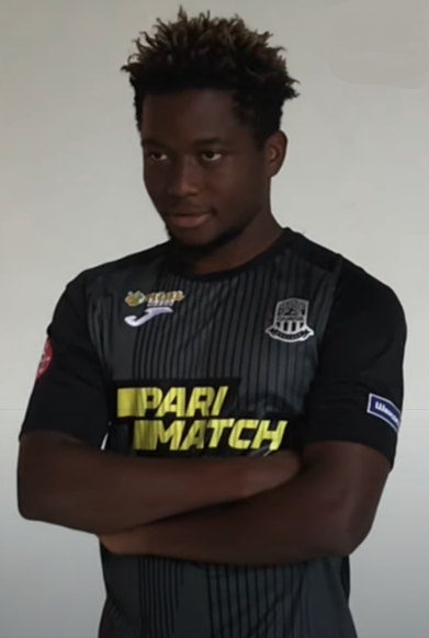 Драман Салу — буркінійський футболіст